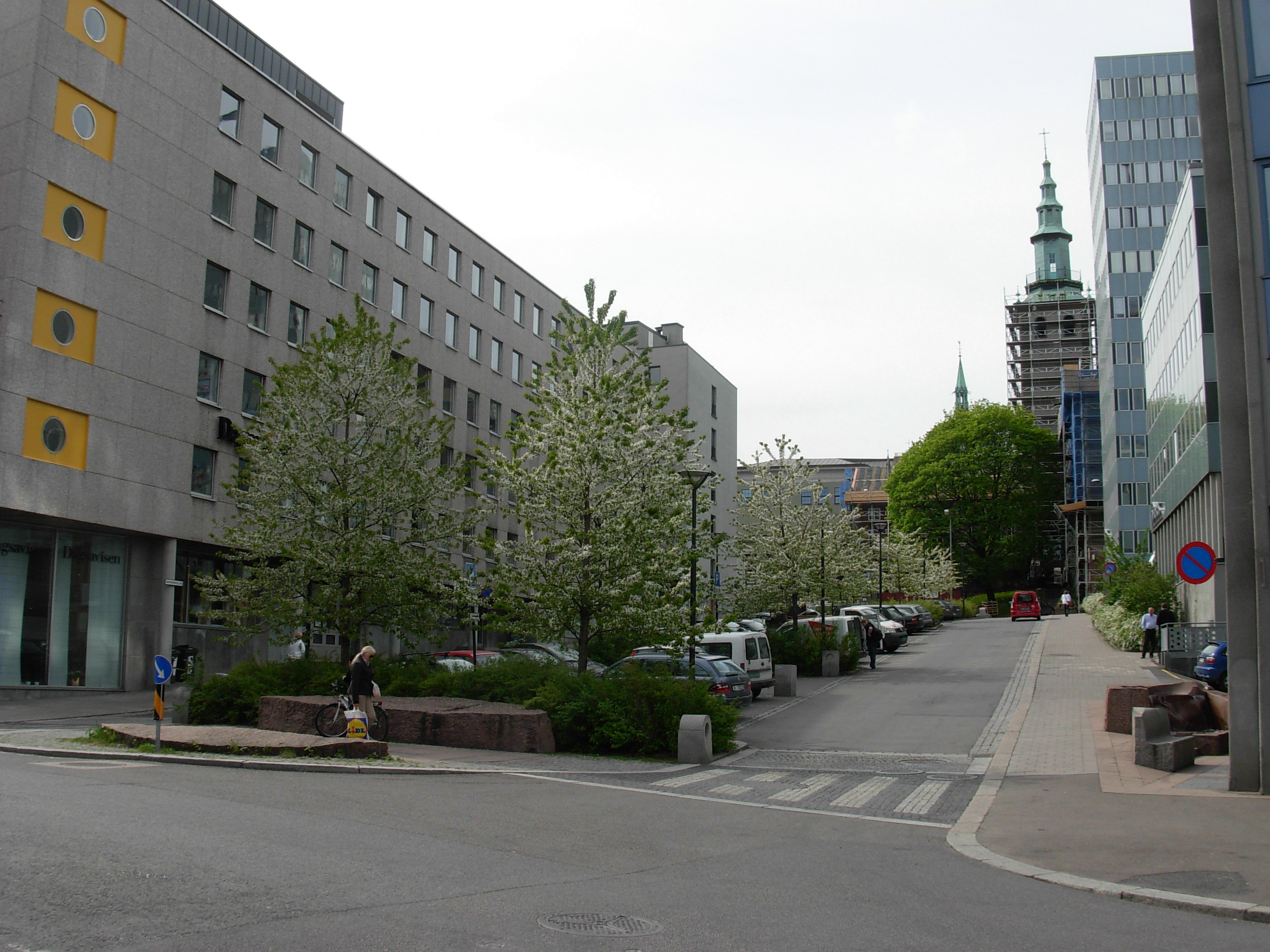 Hammersborg torg, Hammersborg, Oslo